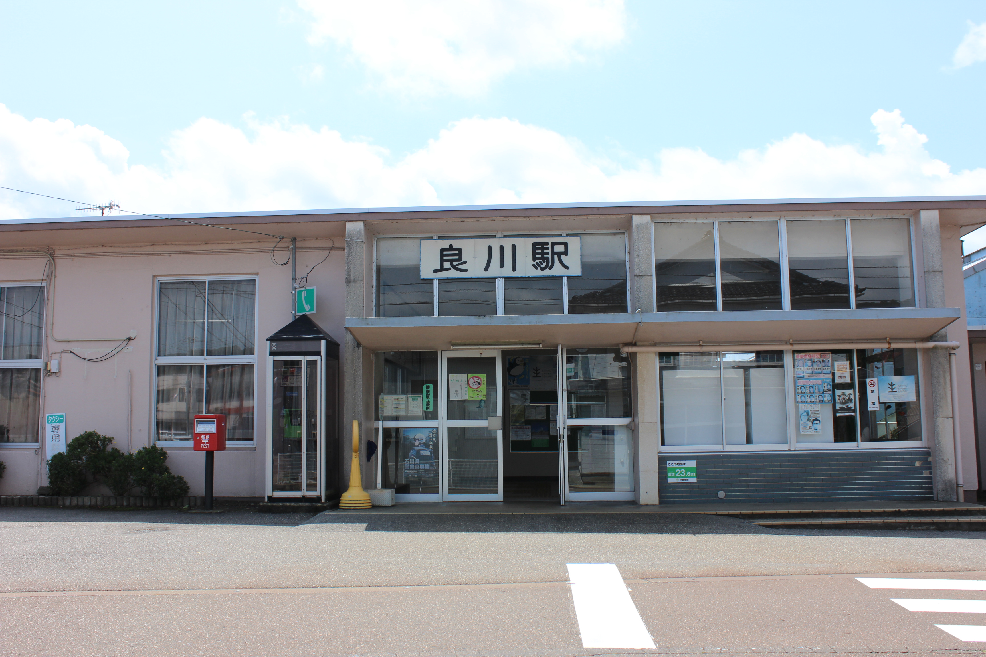 良川駅（石川県鹿島郡中能登町） Canon EOS Kiss X5